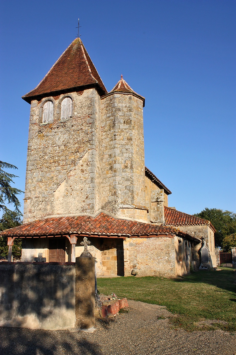 Église Saint-Luperc de Loissan